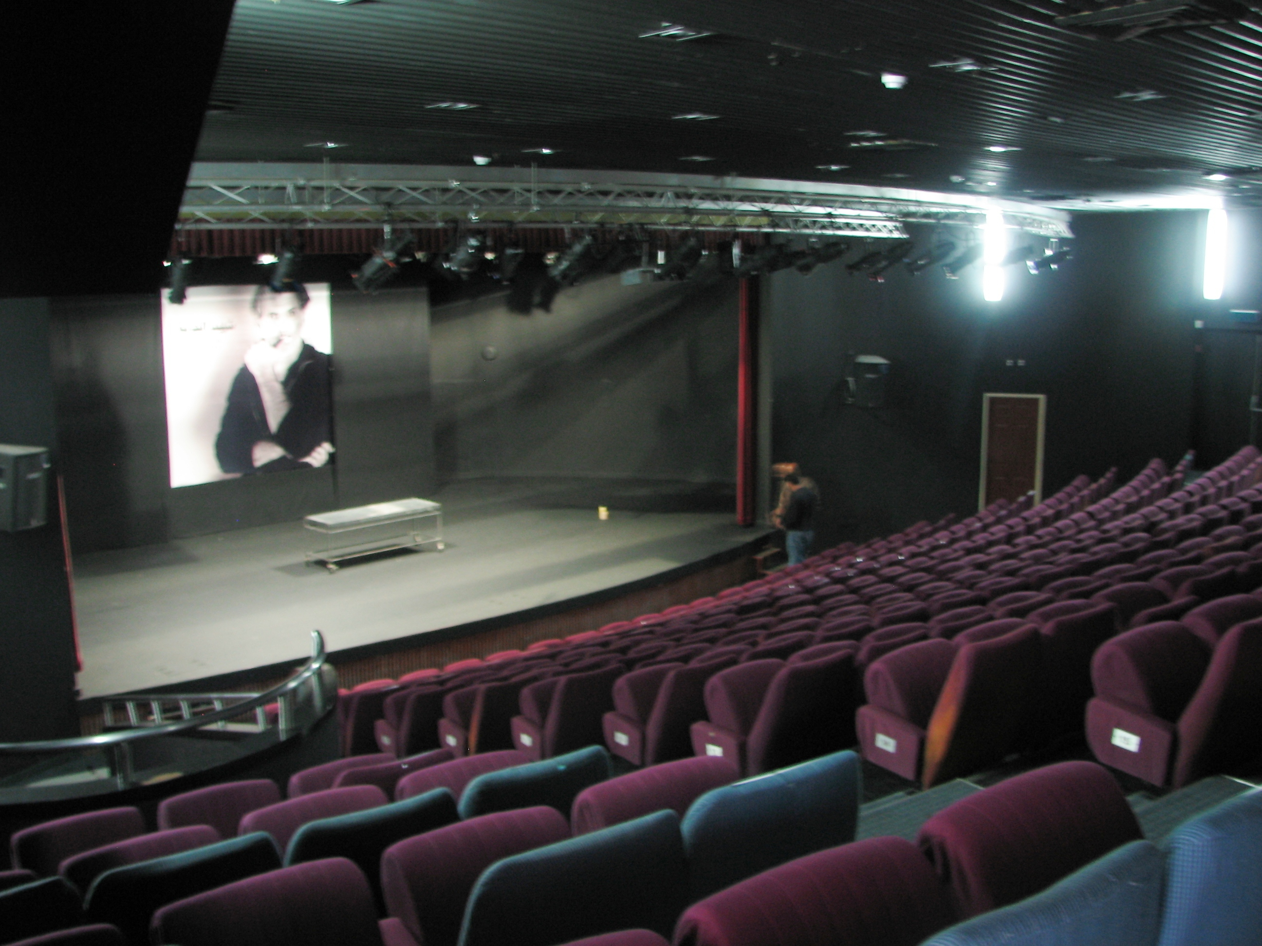 Almidan Theatre, an Arab theatre in Haifa, Israel תיאטרון אלמידאן, התיאטרון הערבי בחיפה, הוקם בשנת 1994 על ידי שרת החינוך והתרבות שולמית אלוני התיאטרון שוכן במגדל הנביאים בשכונת הדר הכרמל בצידו הצפוני של רחוב הנביאים פינת רחוב ח'ורי בחיפה ישראל האולם הגדול אולם 1, 292 מקומות